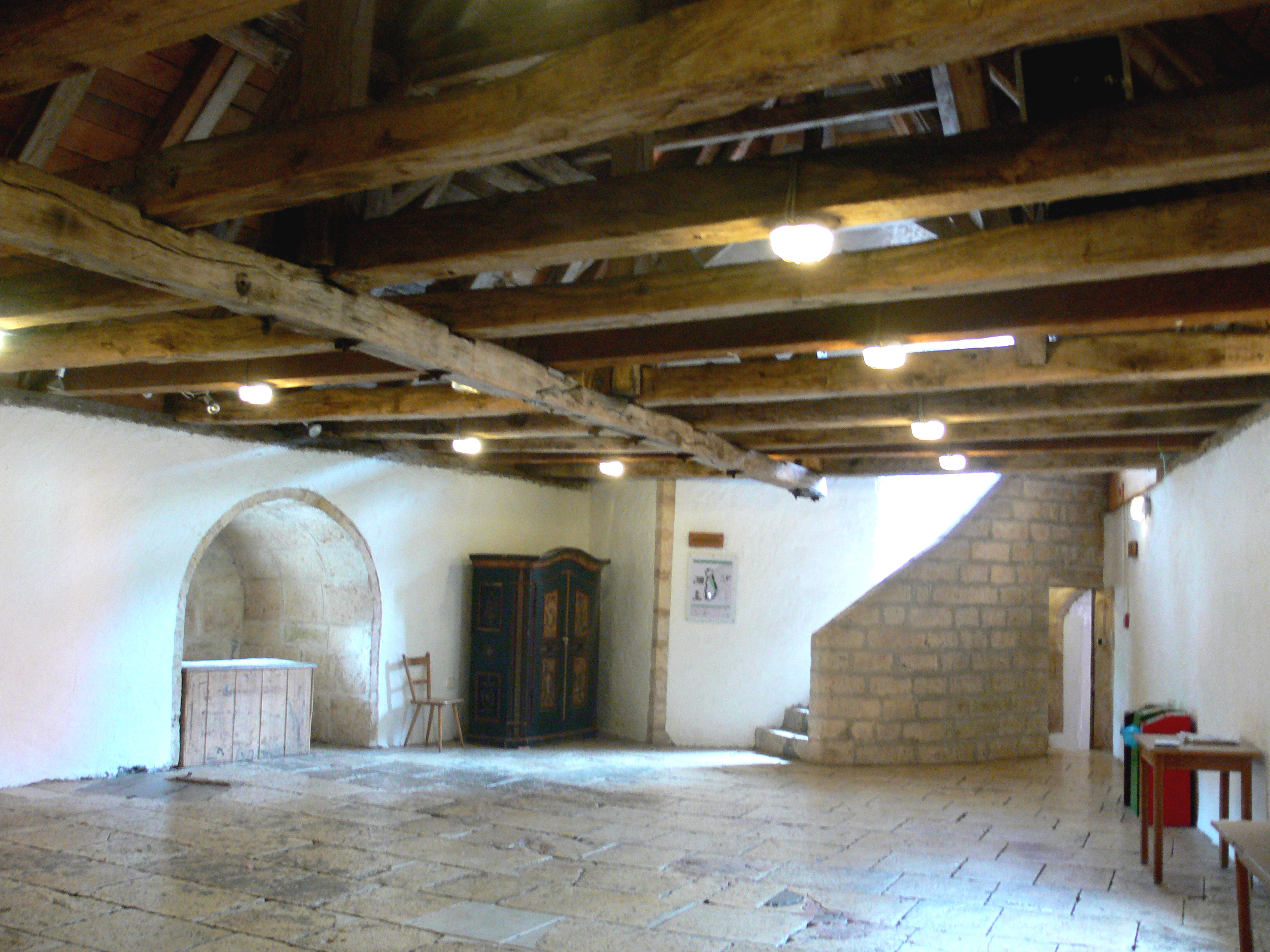 Burg Wildenstein bei Leibertingen Saal in der Hauptbastion